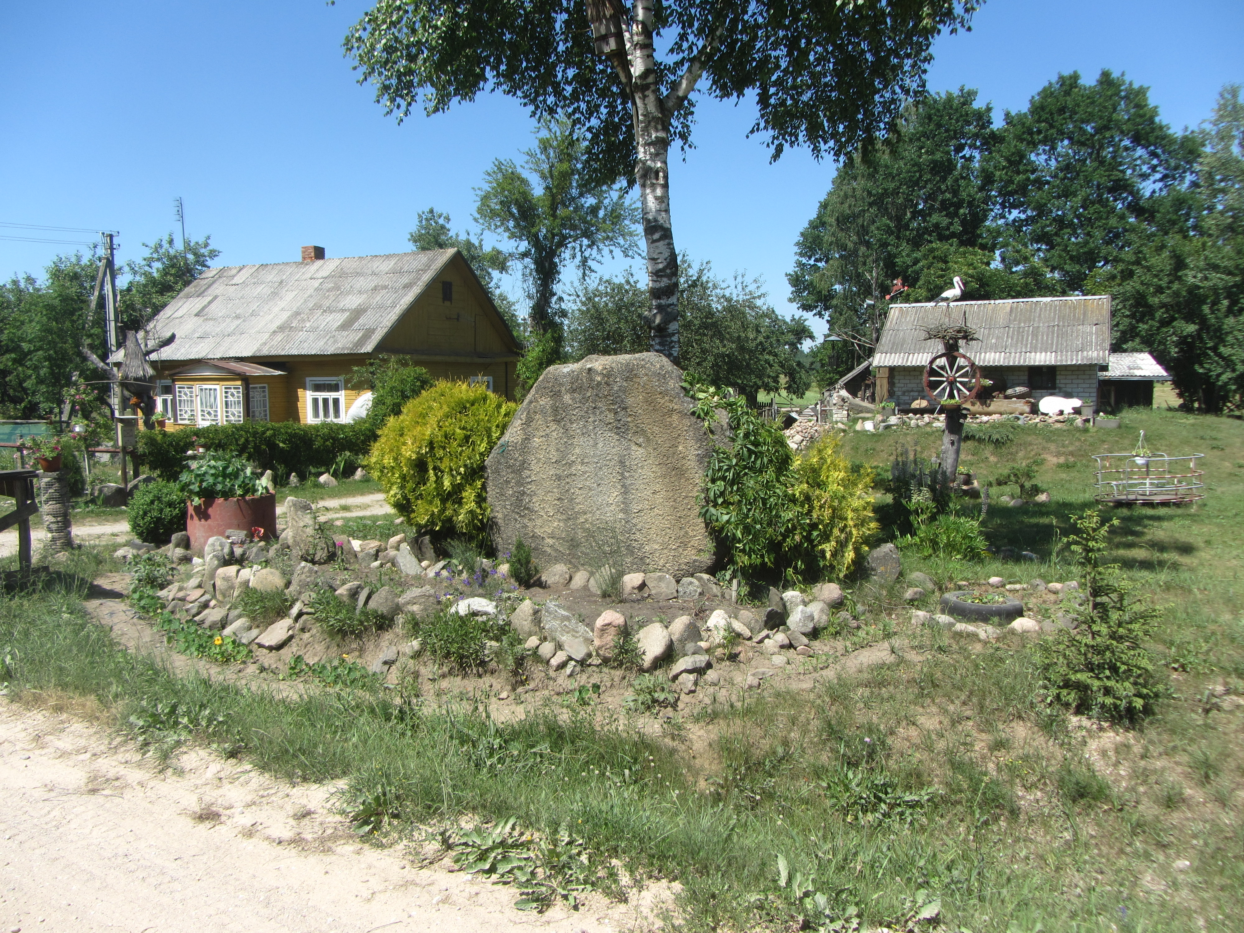 Meškučiai 64184, Lithuania